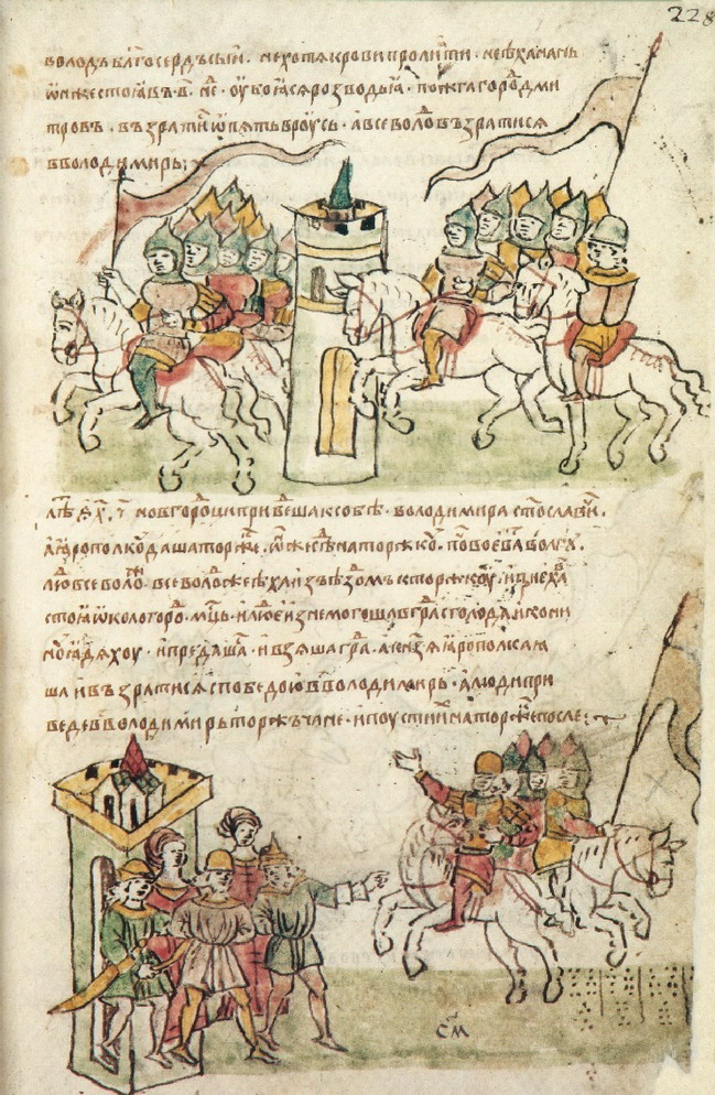 Радзивилловская (Кёнигсбергская) летопись.